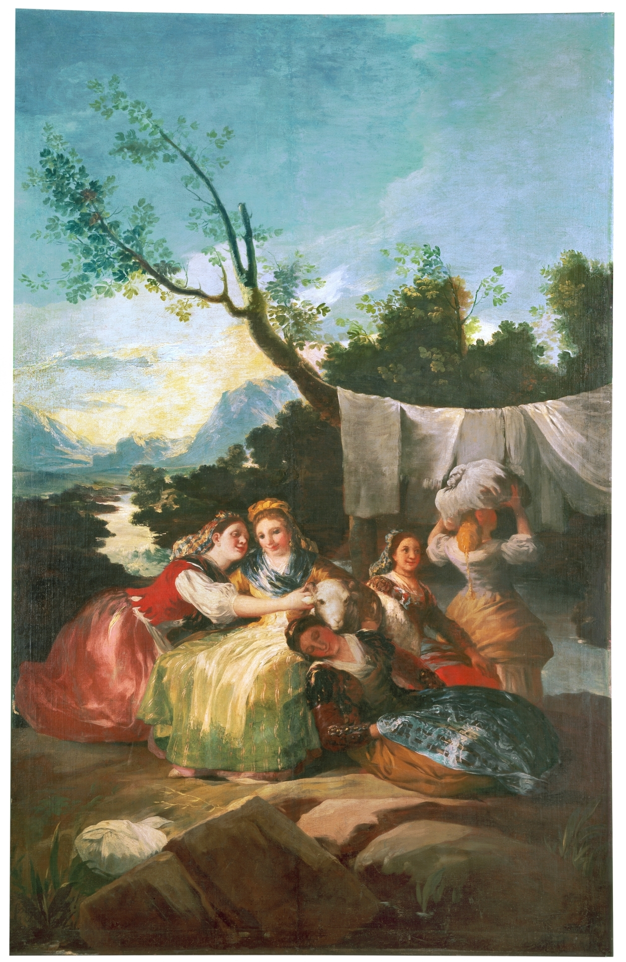 Cartones para tapices.